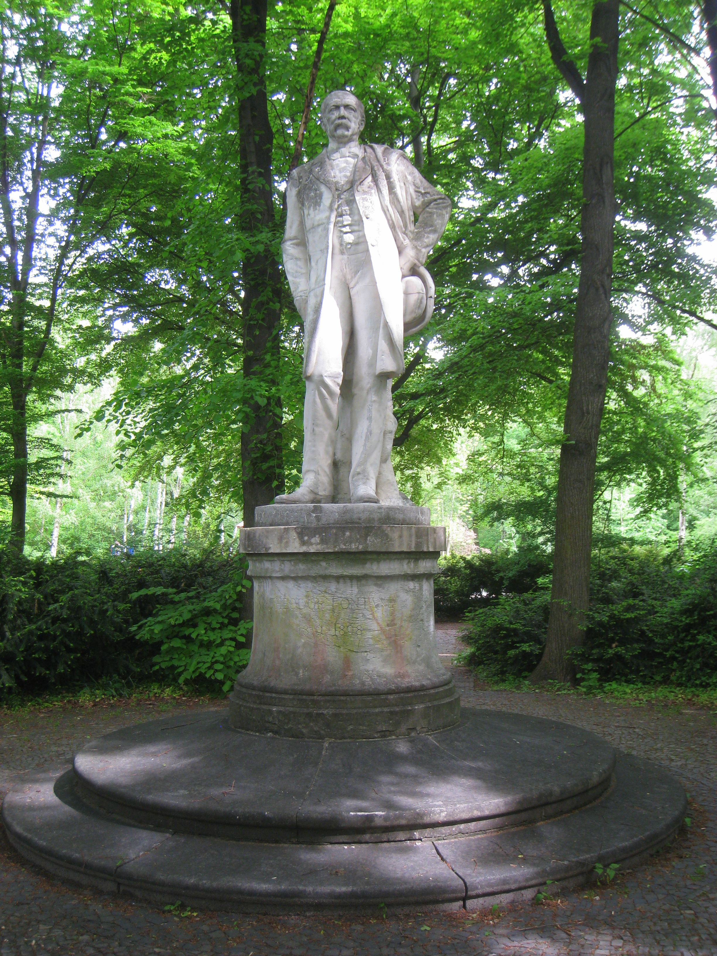 Theodor Fontane by Max Klein, Tiergarten, Berlin, Germany.